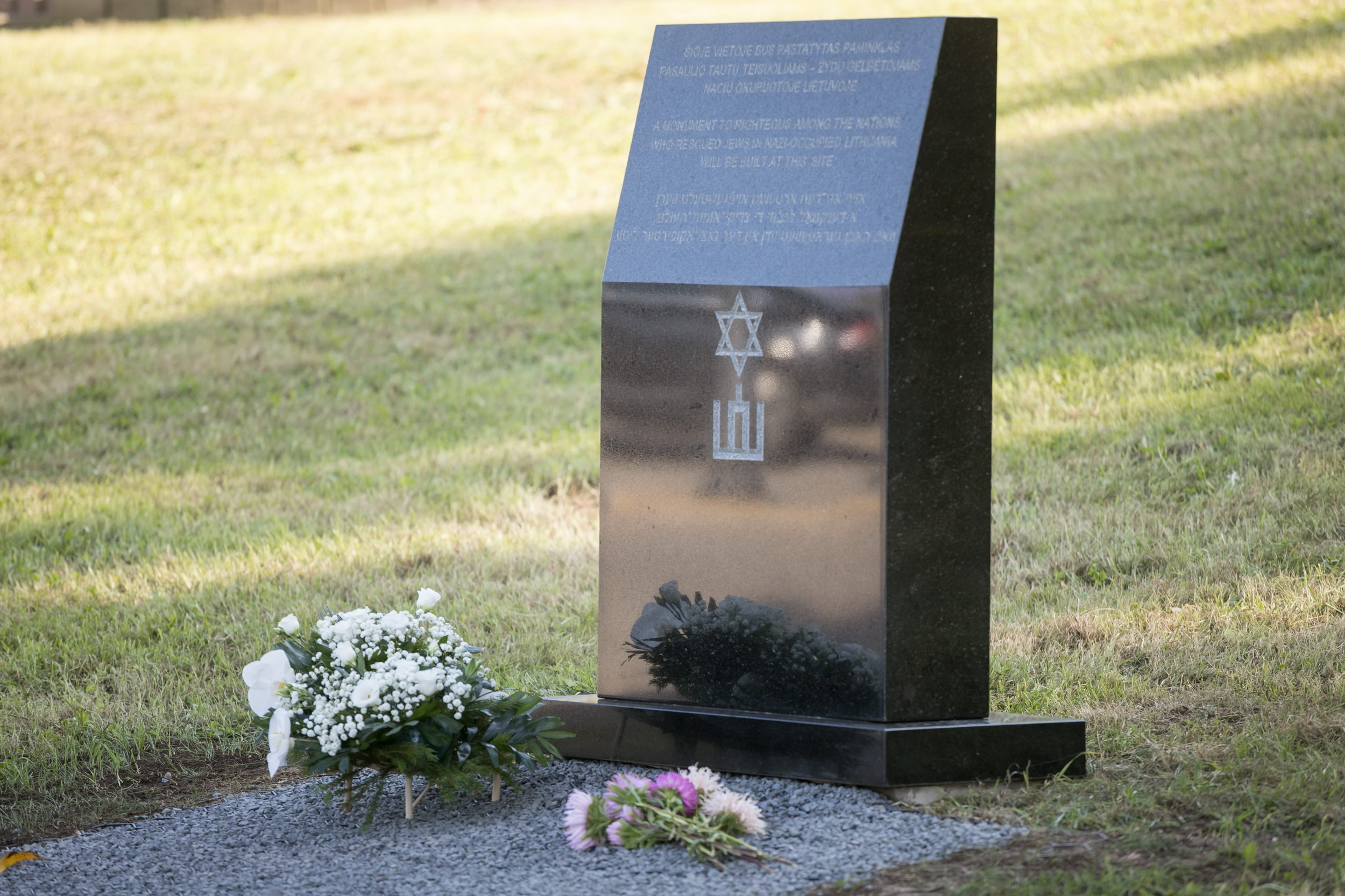 Paminklas teisuoliams Vilniuje